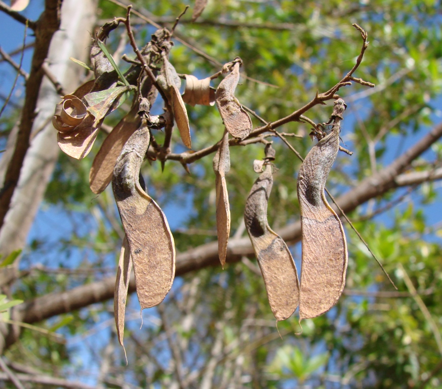 Machaerium hirtum - FABACEAE - Parque Nacional de Brasília - Distrito Federal - Brasil.